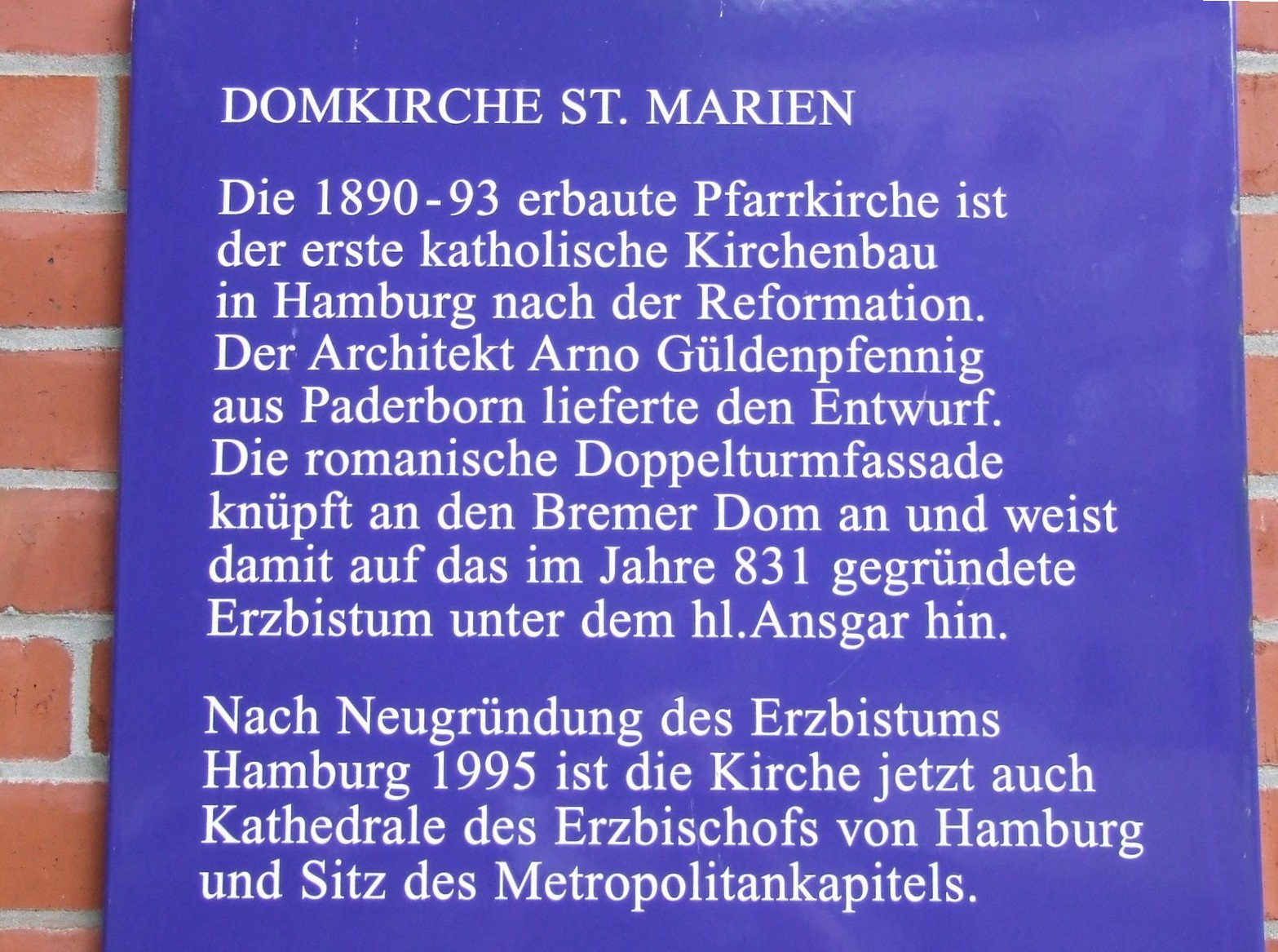 Infotafel an der Domkirche St. Marien in Hamburg-St. Georg.2007_07290063